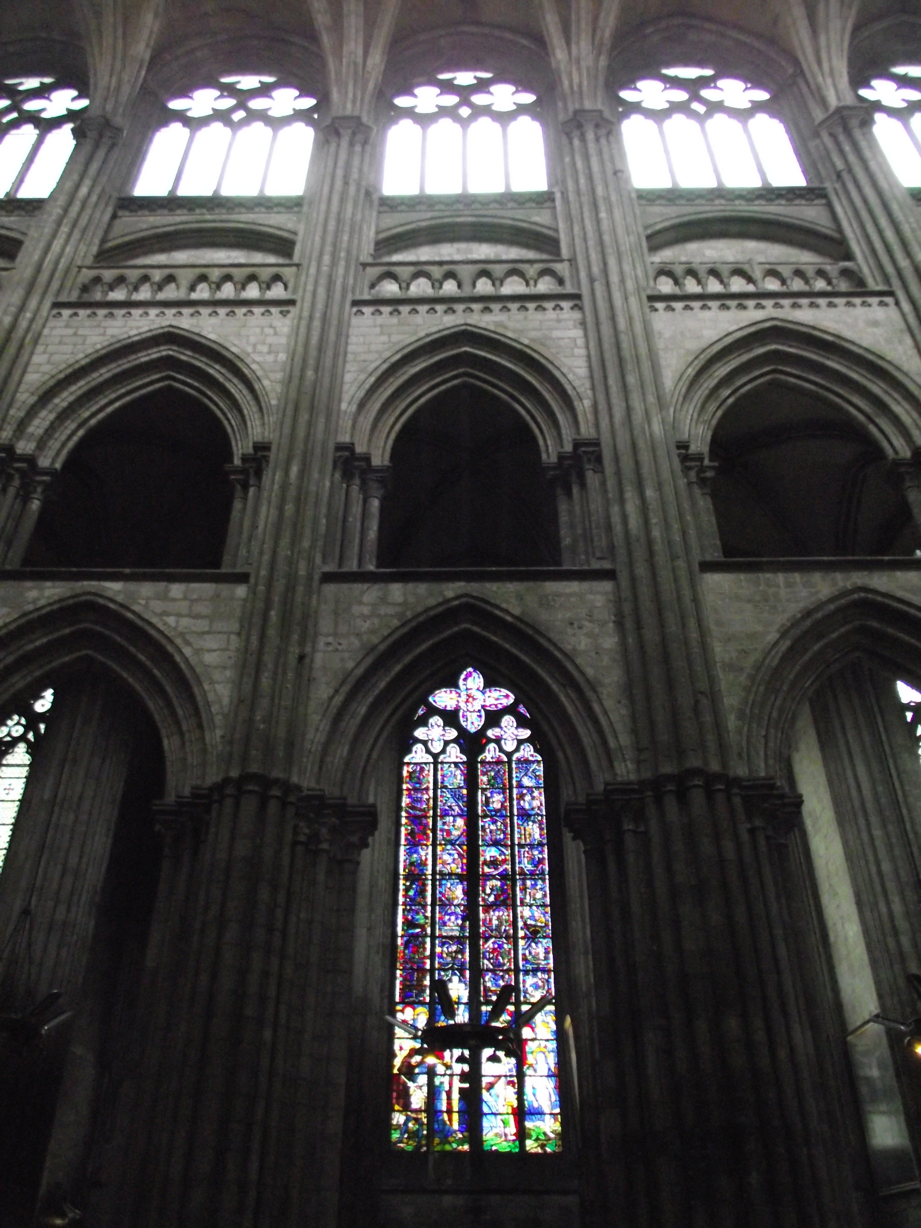 Rouen, Cathédrale Notre-Dame